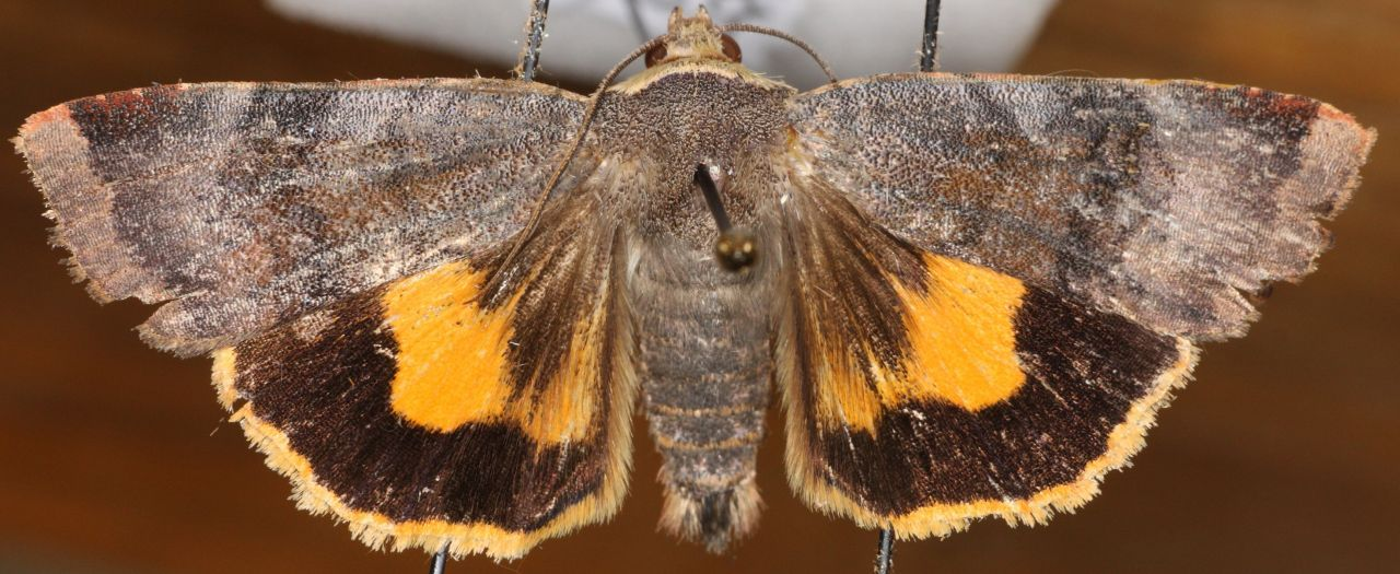 Fiolett båndfly Noctua janthe har nokså brede bånd på bakvingene.Template:Byline